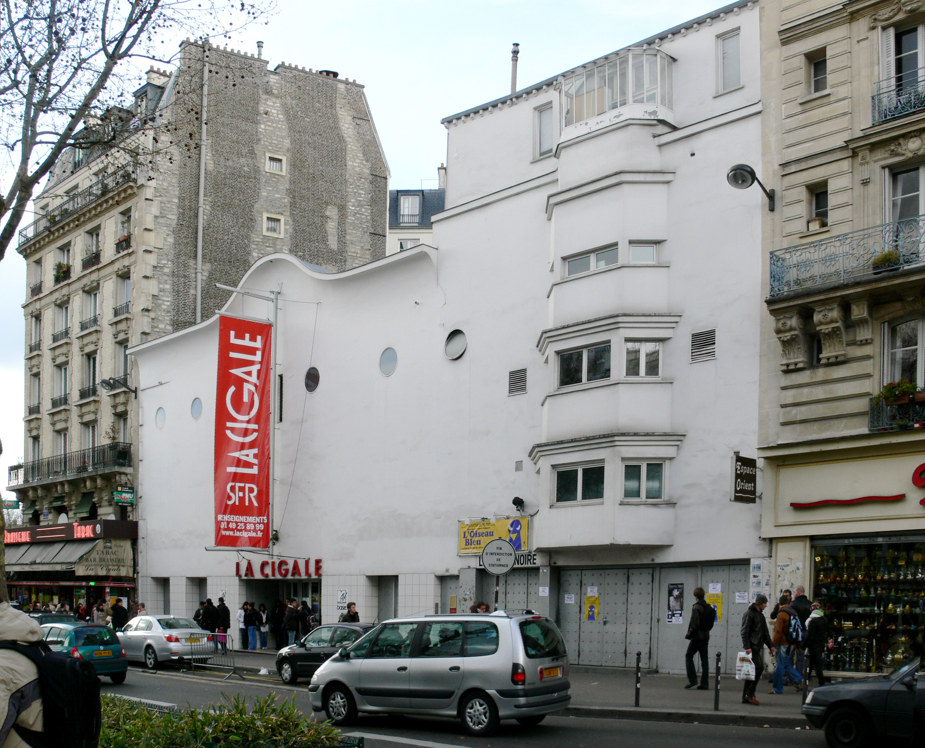 La Cigale, boulevard de Rochechouart, Paris XVIIIe, France